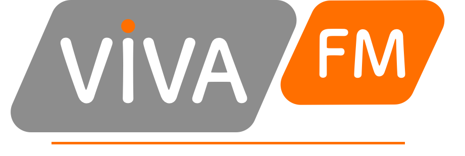 Logo de la radio peruana Viva FM.